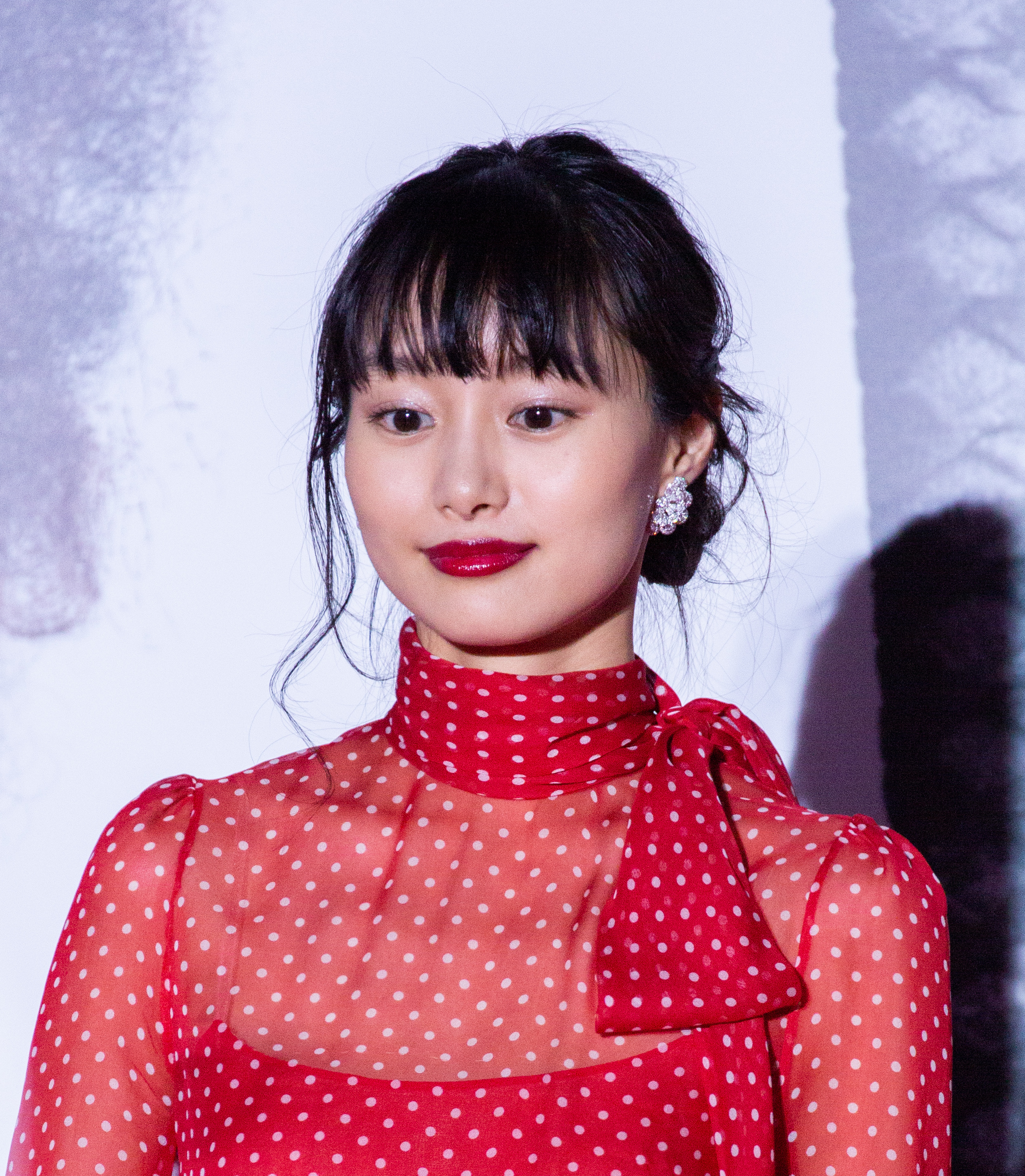 デッドプール2 ジャパン・プレミア レッドカーペット 忽那汐